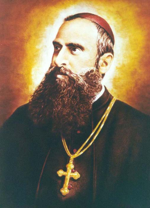 Bischof Antonio Roveggio, Comboni Missionar, Apostolischer Vikar von Karthum